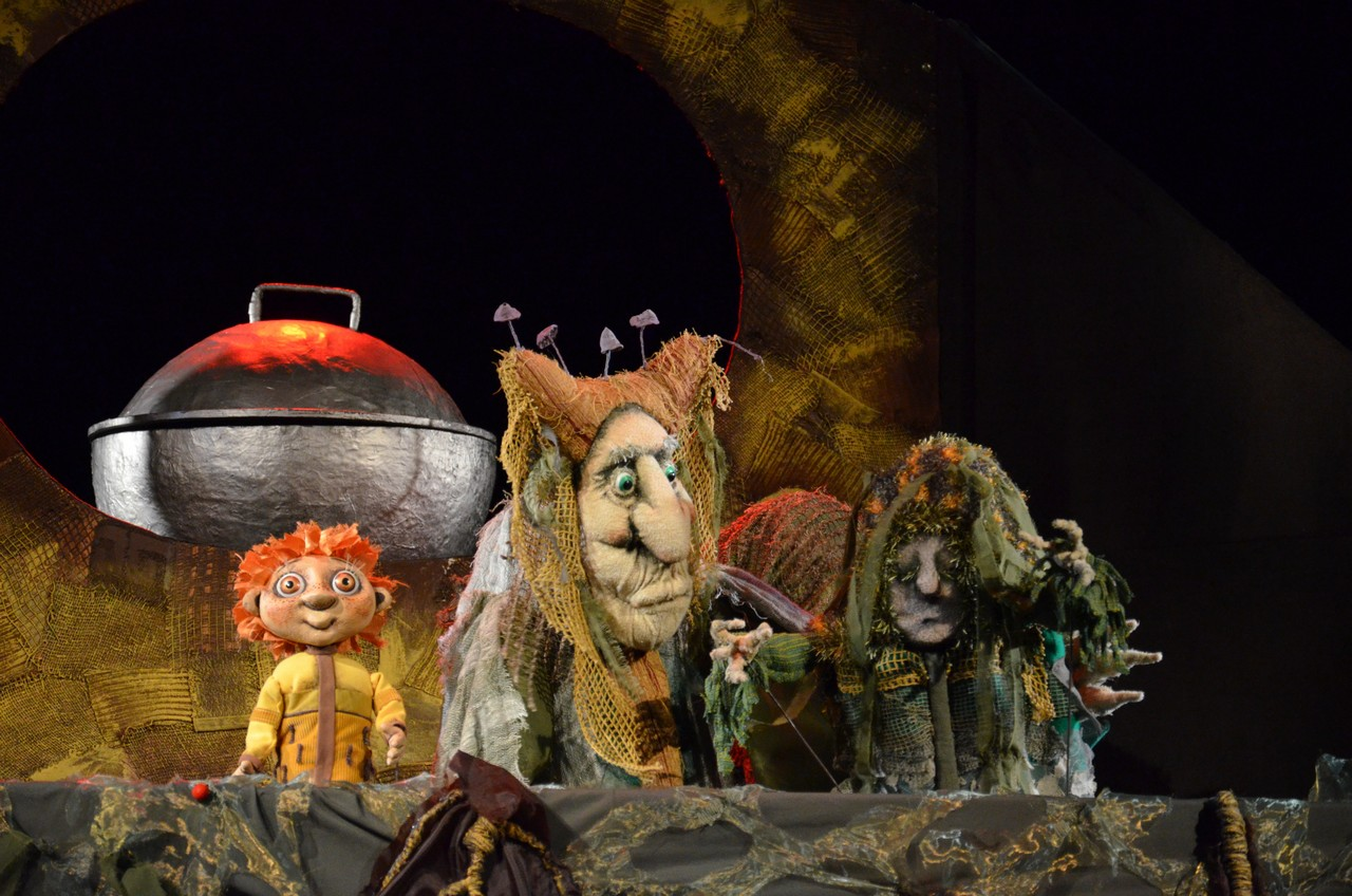 Спектакль «Терёшечка». Режиссёра из Санкт-Петербурга Л. Фёдорова, художник Александра Ковальская. Белгородский государственный театр кукол